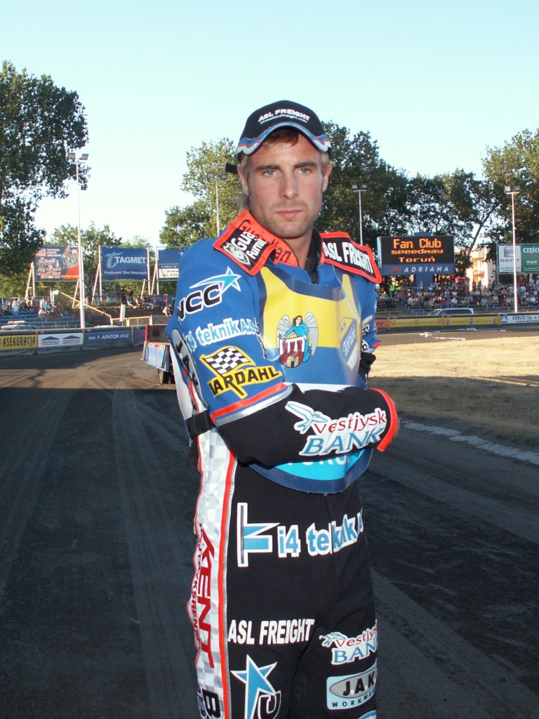 Niels Kristian Iversen